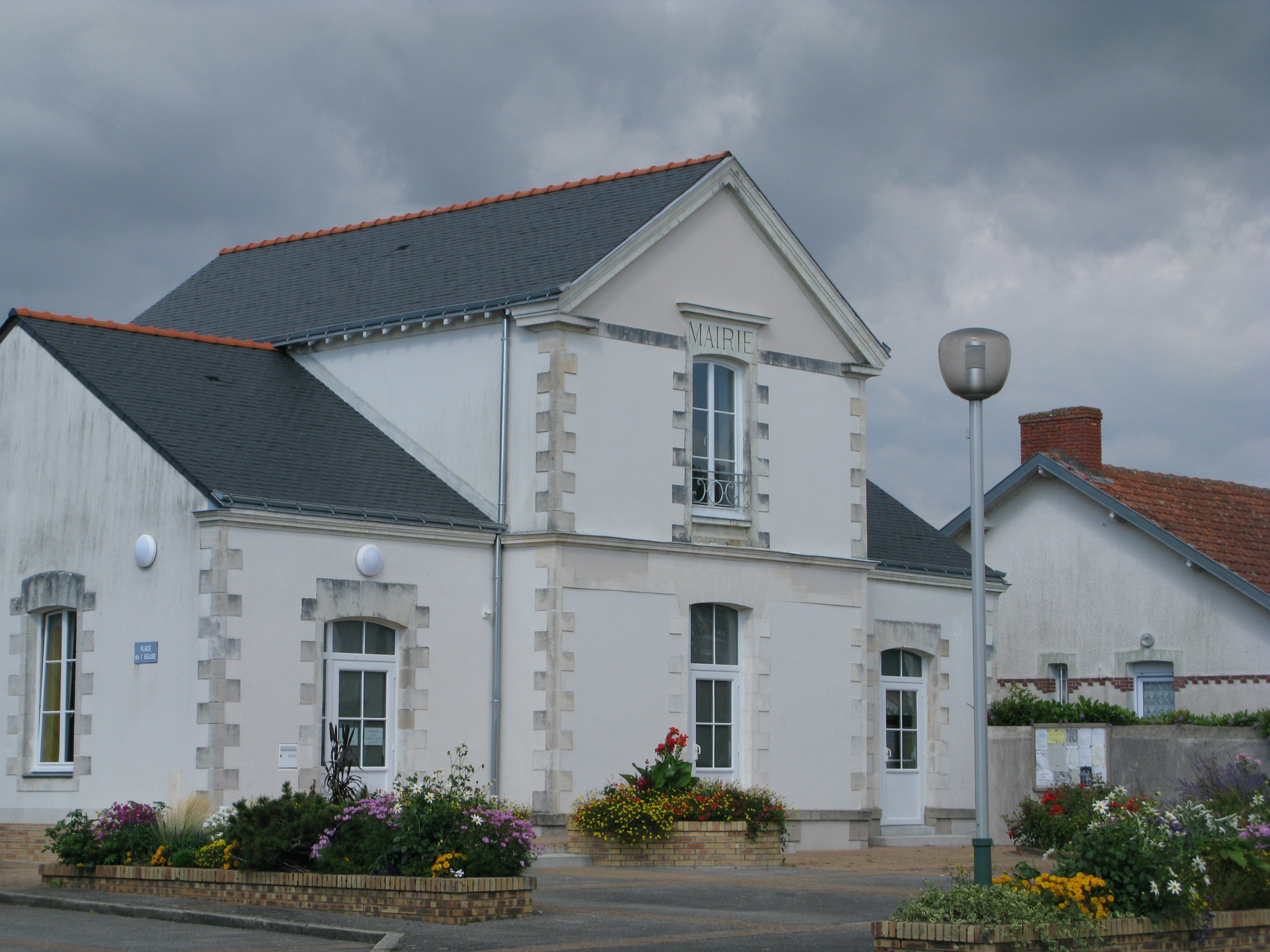 Mairie de La Marne